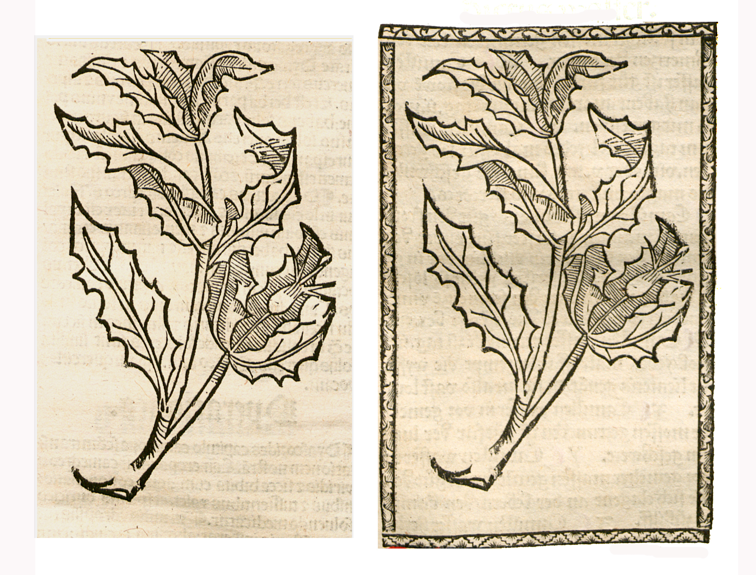 Abbildung von: Benediktenkraut